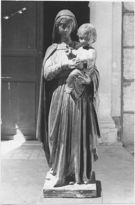 Skulptur Madonna mit Kind in der Saint-Martin Anglefort